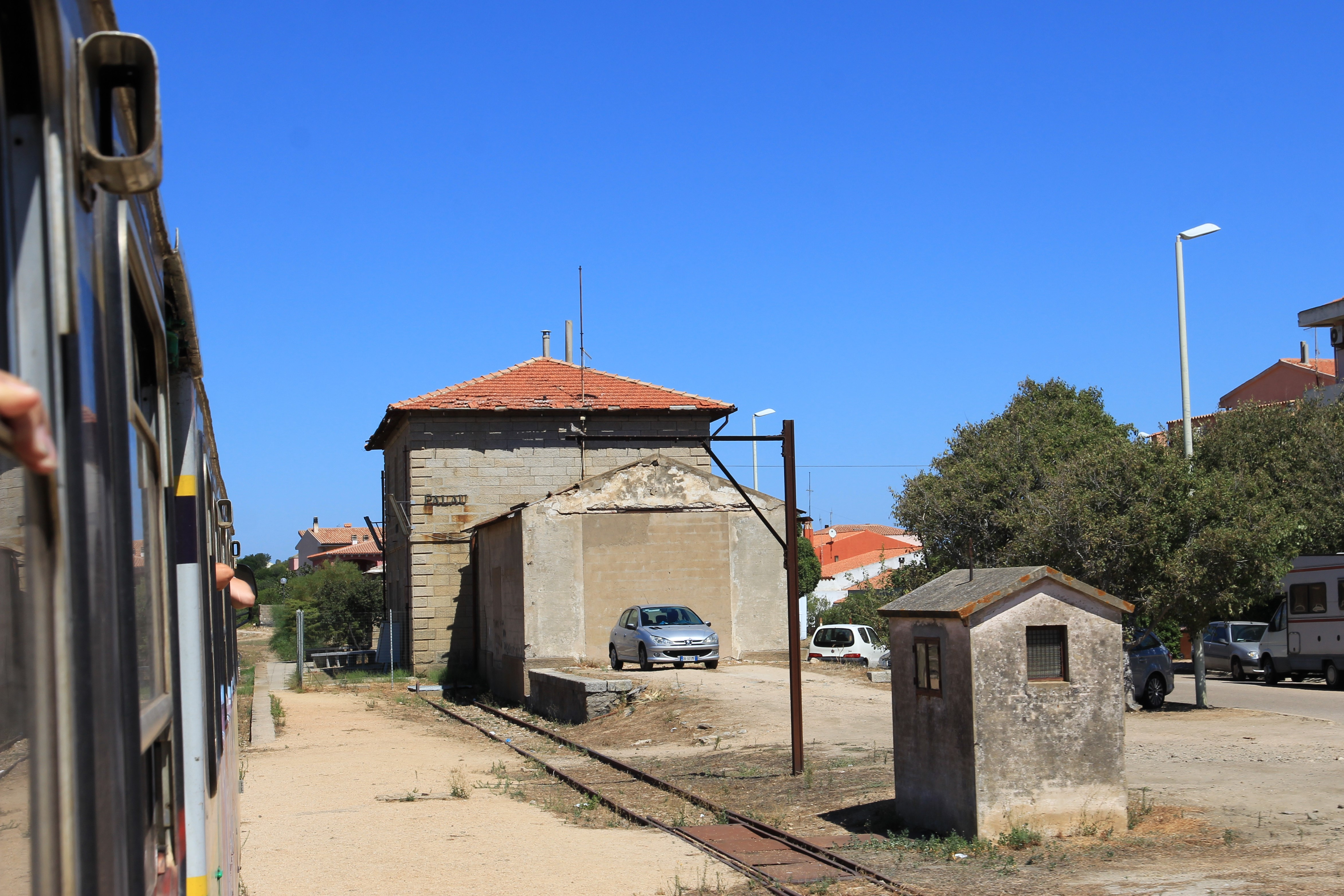 Palau, stazione ferroviaria